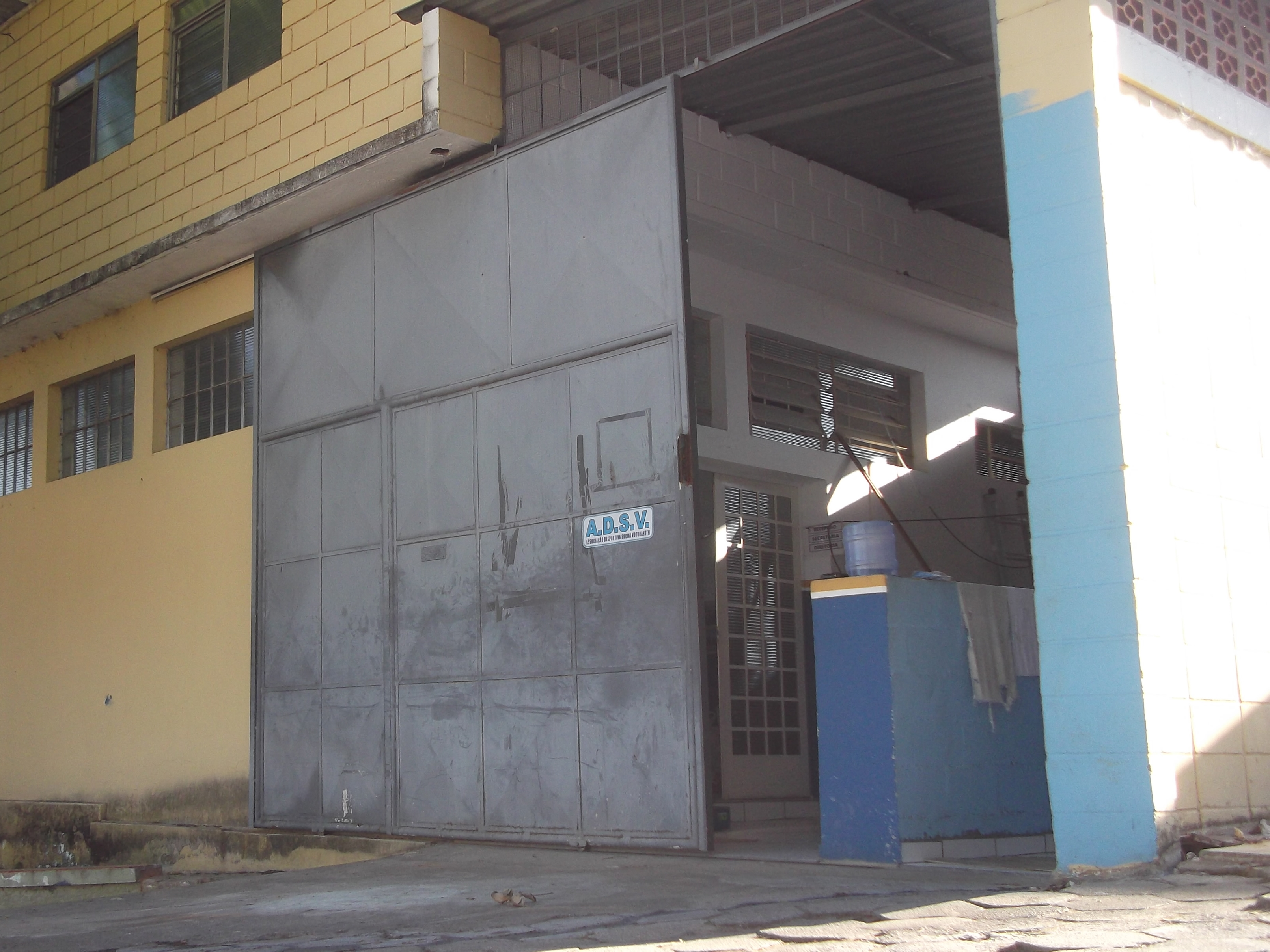 Entrada da Associação Desportiva Social Votorantim